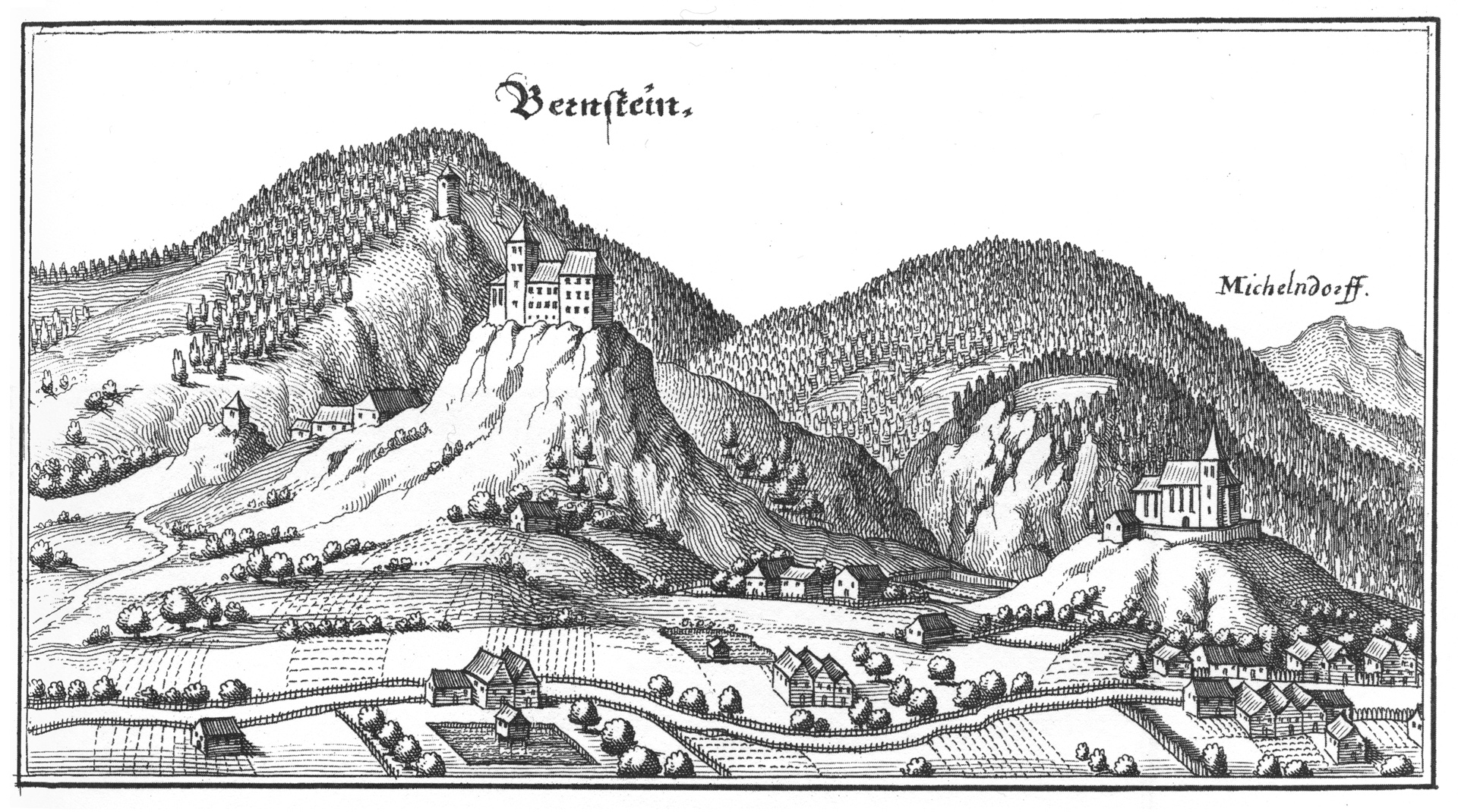 Altpernstein und Micheldorf in Oberösterreich (Kupferstich von Matthäus Merian)